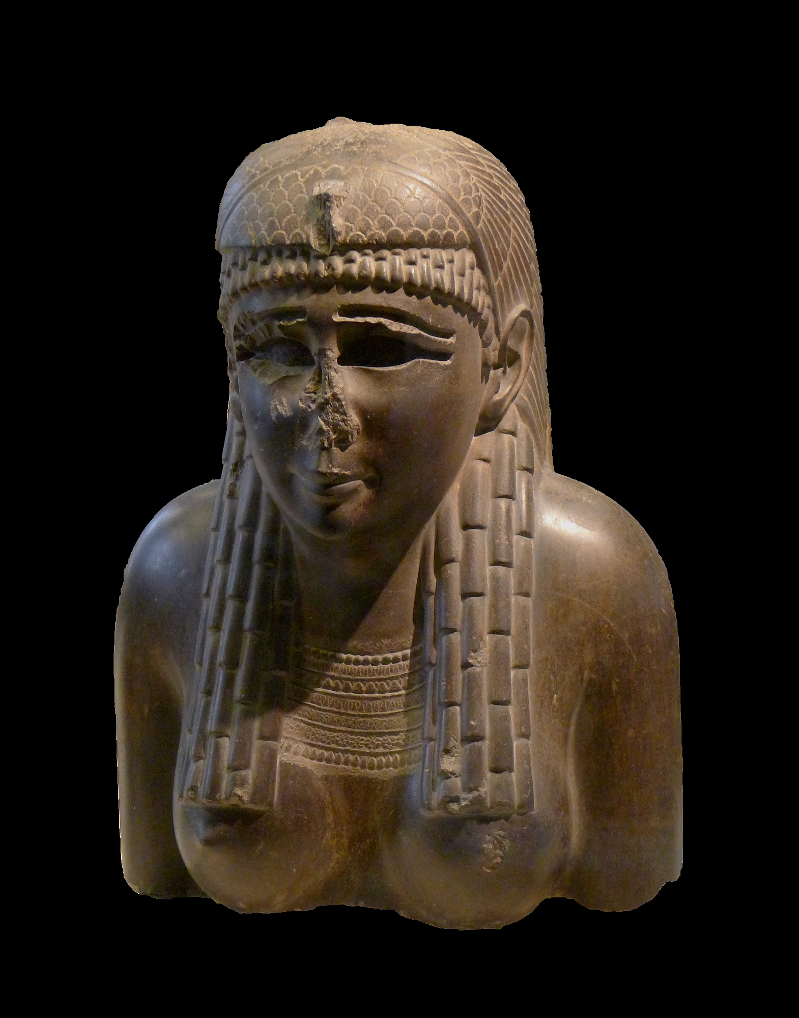 Une reine ou une déesse